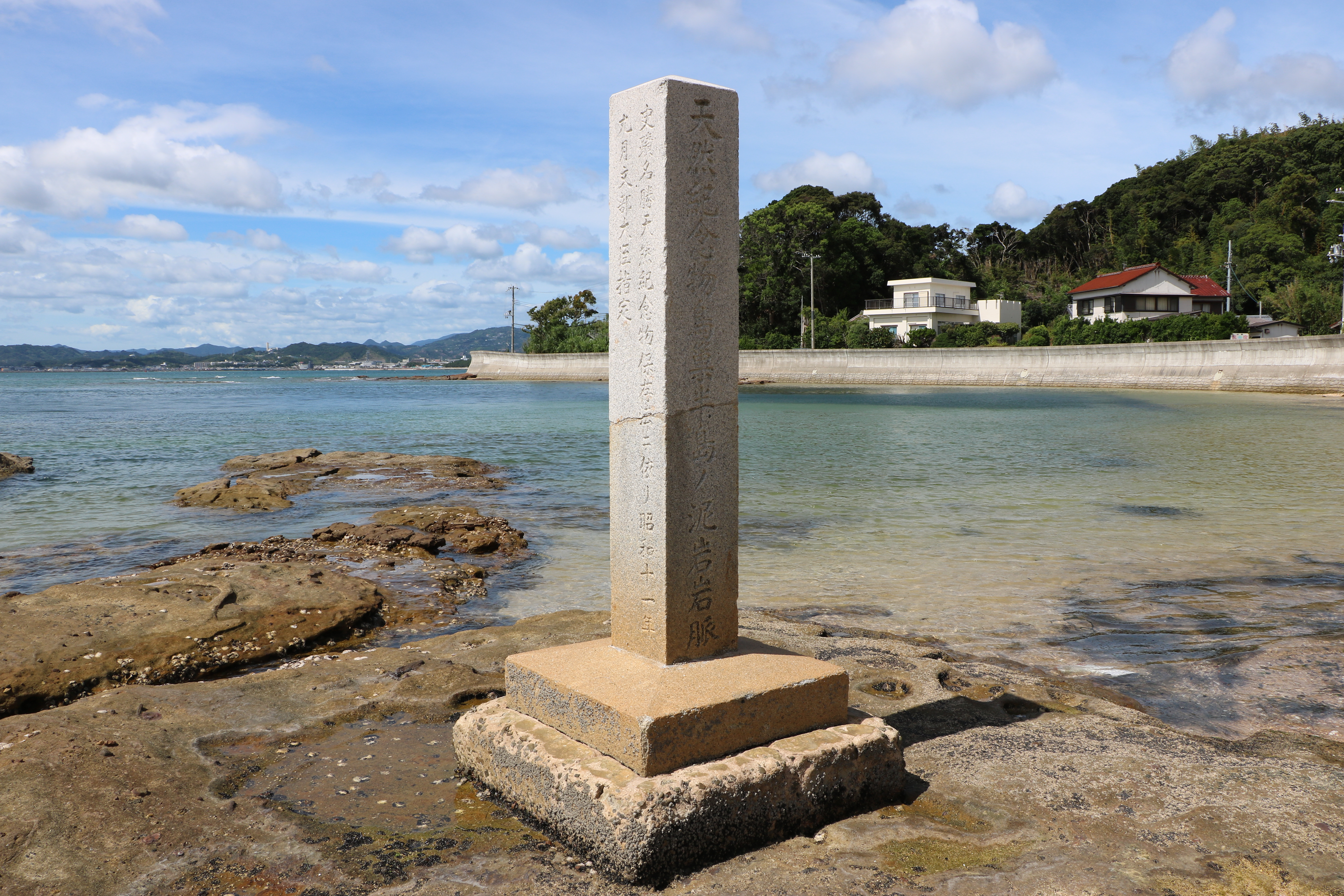 鳥巣半島の泥岩岩脈（国指定天然記念物、和歌山県田辺市）天然記念物石碑。